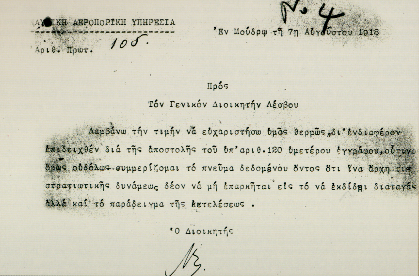 Η απάντηση του Αριστείδη Μωταϊτίνη στον Γενικό Διοικητή Λέσβου για τις ριψοκίνδυνες αποστολές που αναλαμβάνει εναντίων της τουρκο-γερμανικής αεροπορίας (7 Αυγούστου 1918)